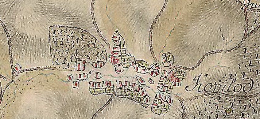 Localitatea Comlod și palatul în Ridicarea Iozefină (1769-1773)